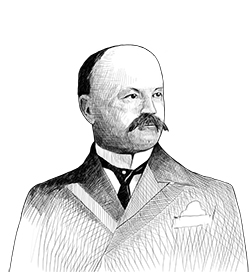 Dessin de Raymond Préfontaine (1850-1905).